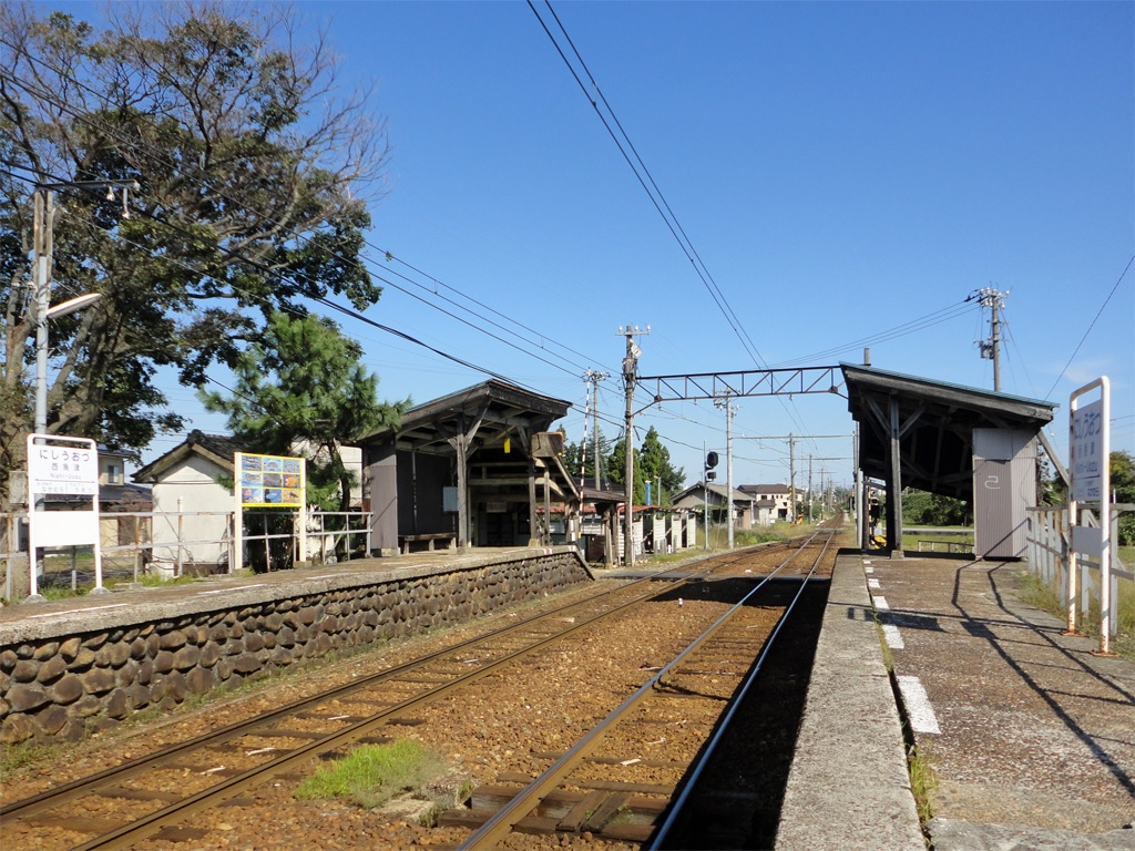 富山地方鉄道本線西魚津駅ホーム